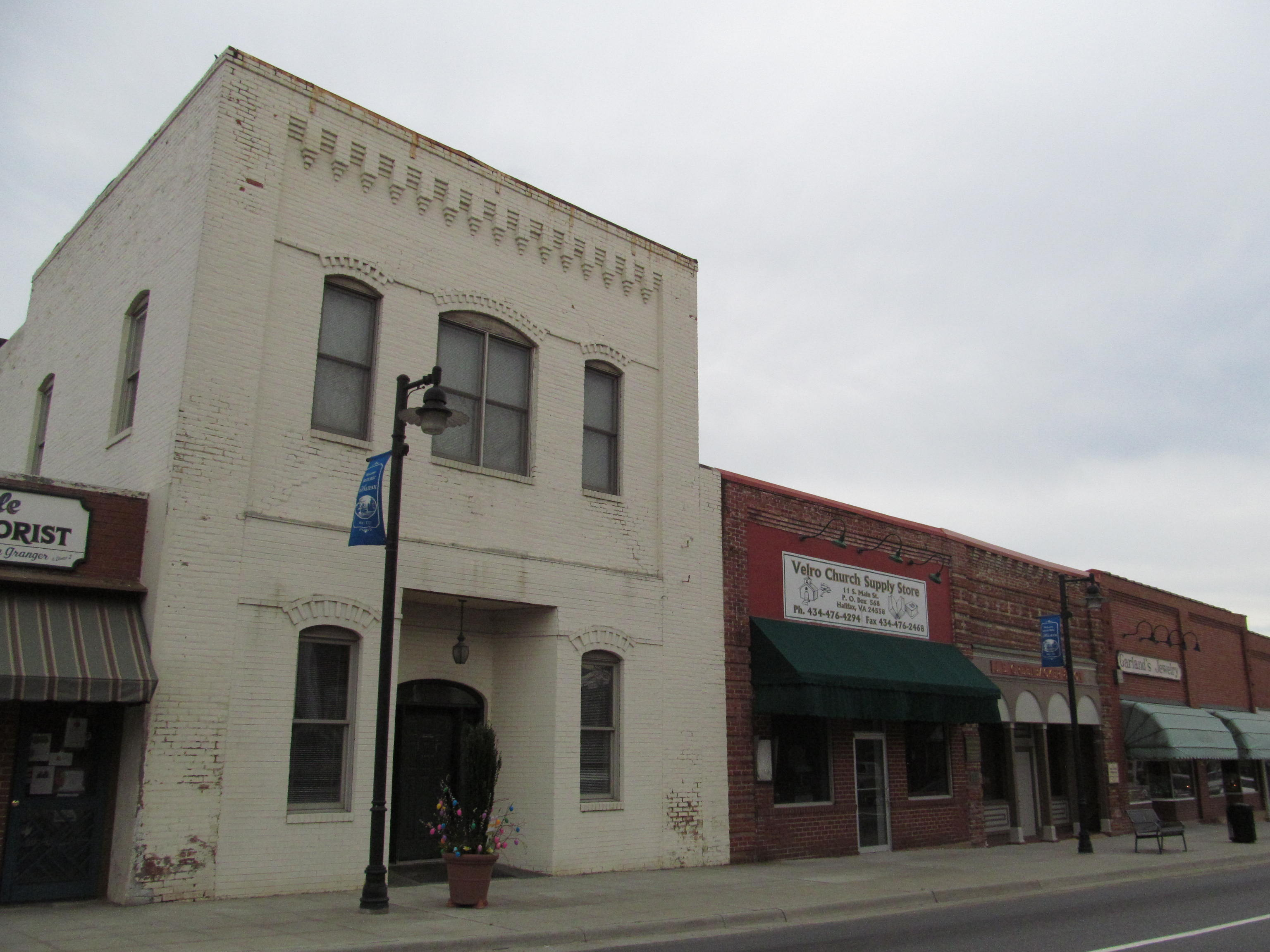 Halifax, Virginia